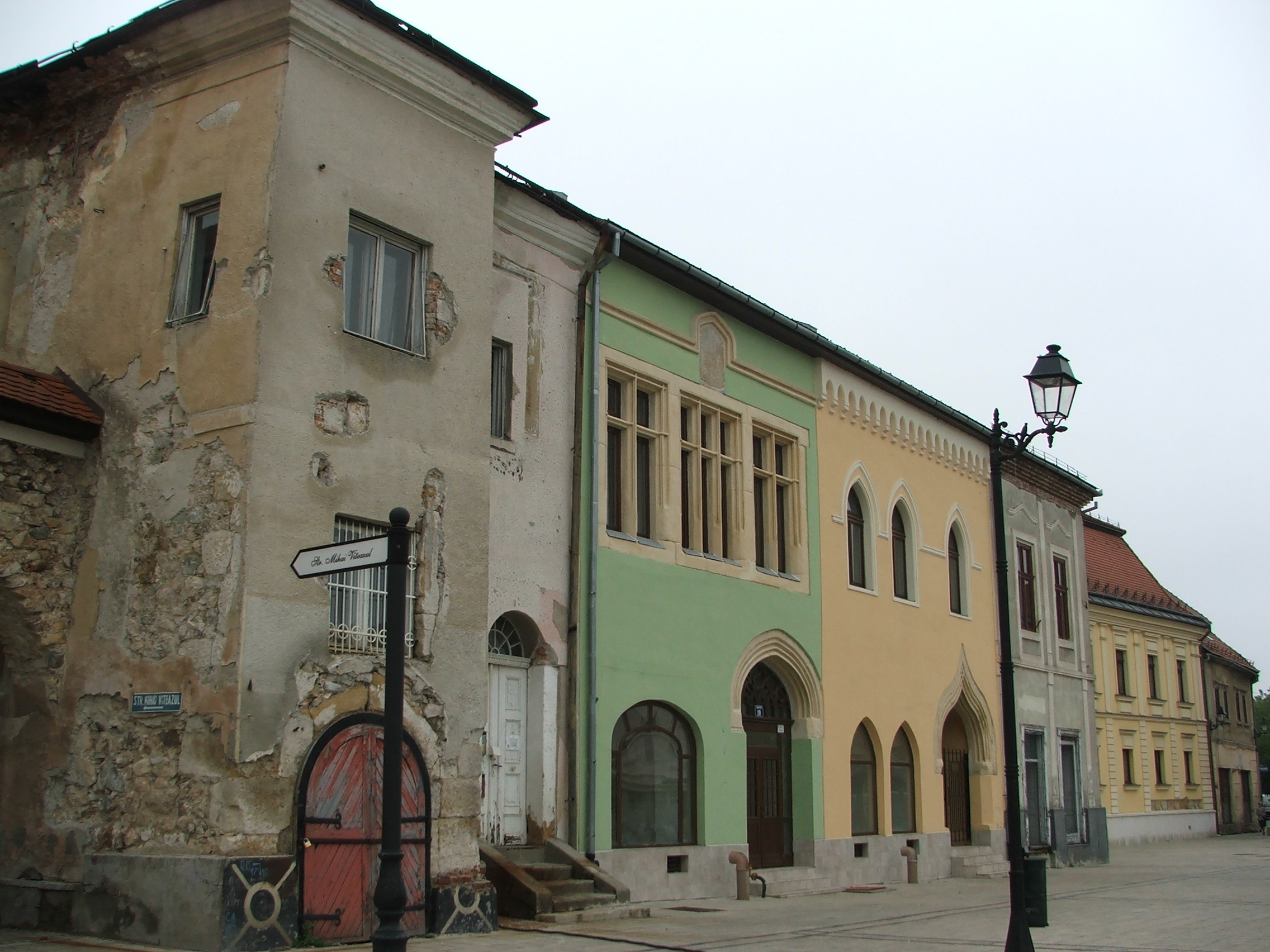 Nagybánya, főtér, Erzsébet-ház (Máramaros megye, Erdély)